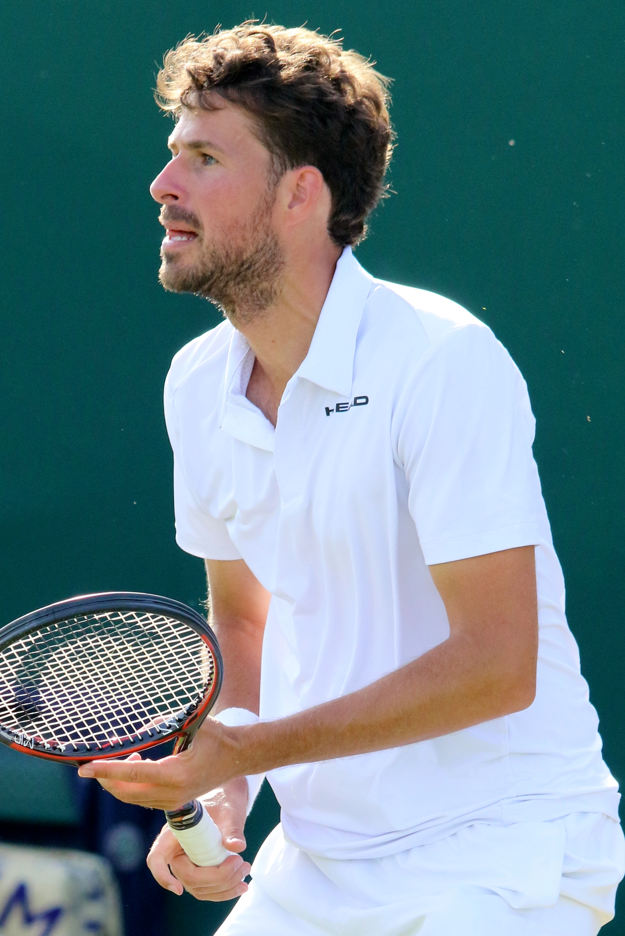 Haase WM17 (2)